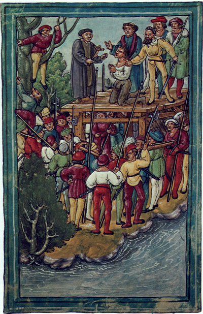 Hans Waldmann just before being beheaded at Zurich (1489)